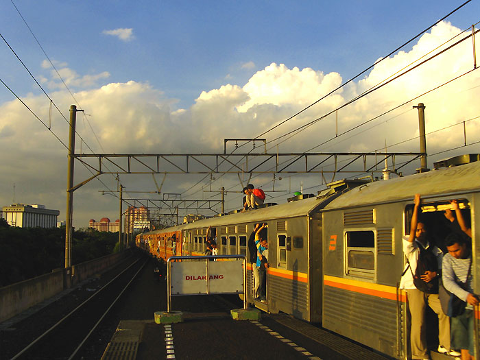 stasiun gambir